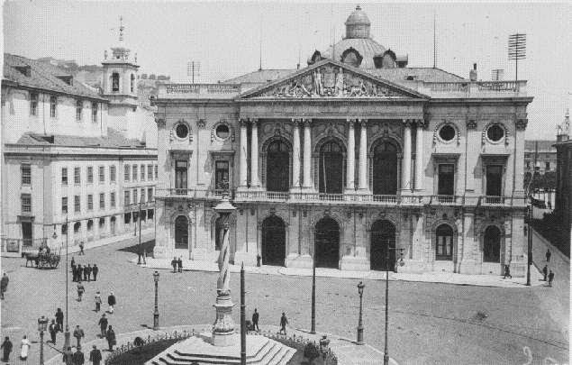 Praça/Largo do Municipio/Pelourinho